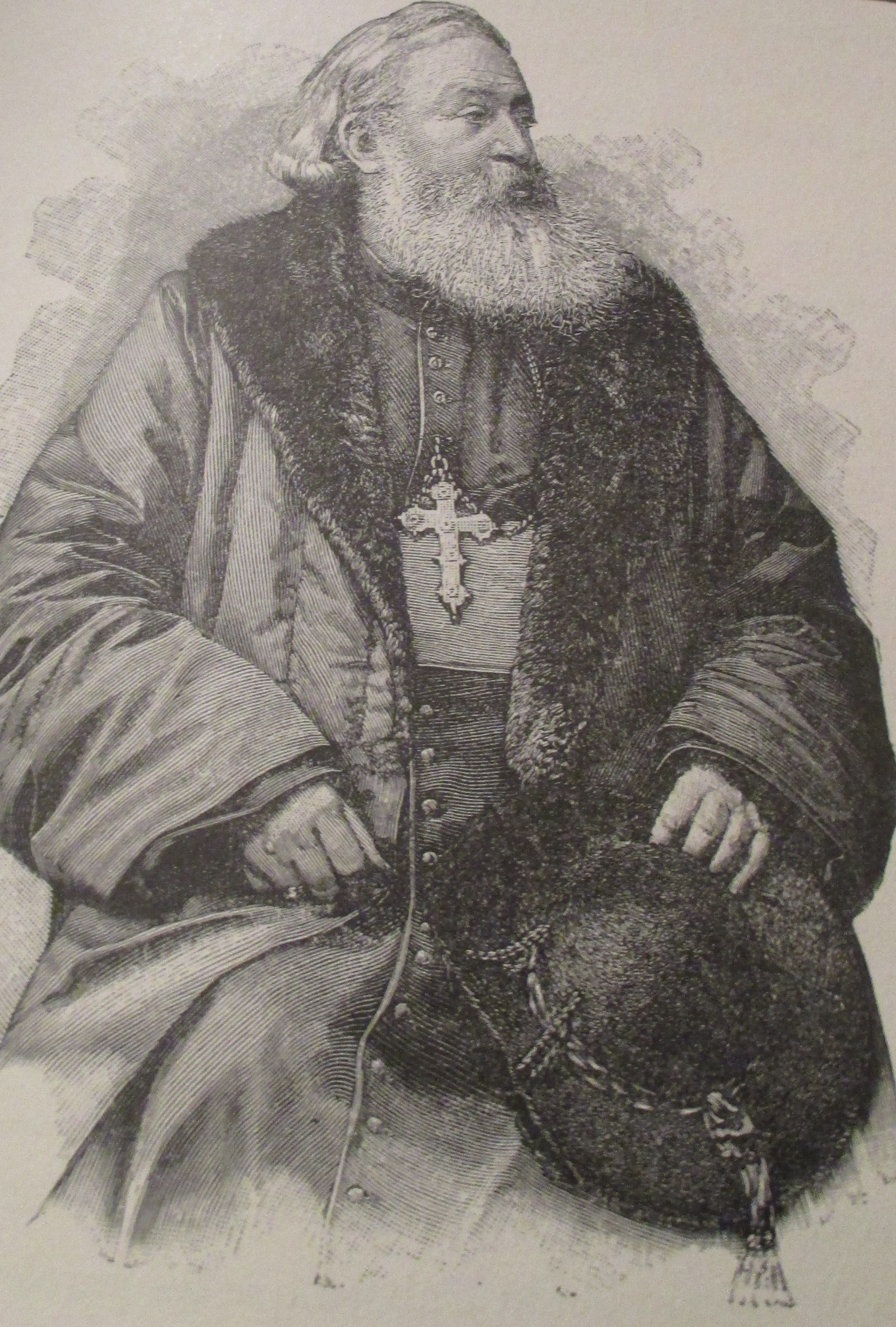 Mgr Favier, évêque de Pékin, in "En Chine au Tché-Ly Sud-Est: une mission d'après les missionnaires",du Père Henri-Joseph Leroy, s.j., éd. Desclée de Brouwer, 1900